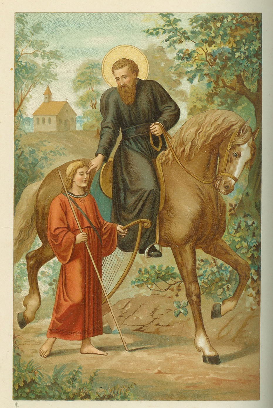 Der heilige Liudger heilt den blinden Sänger Bernlef